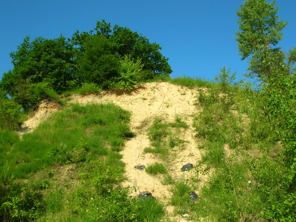 Zbocze Łęgnowskie w Bydgoszczy